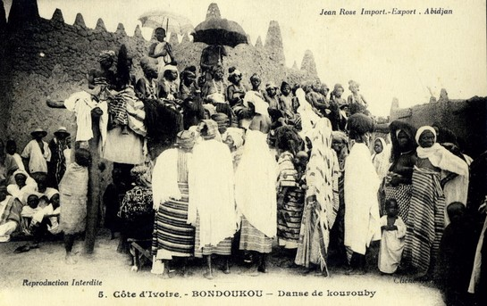 Bondoukou, Danse de kourouby - La danse du Kourouby est une fête qui marque la fin du mois sacré du Ramadhan dans la religion musulmane. On la célèbre la nuit du destin ou le jour du Laïlat ul kadr.